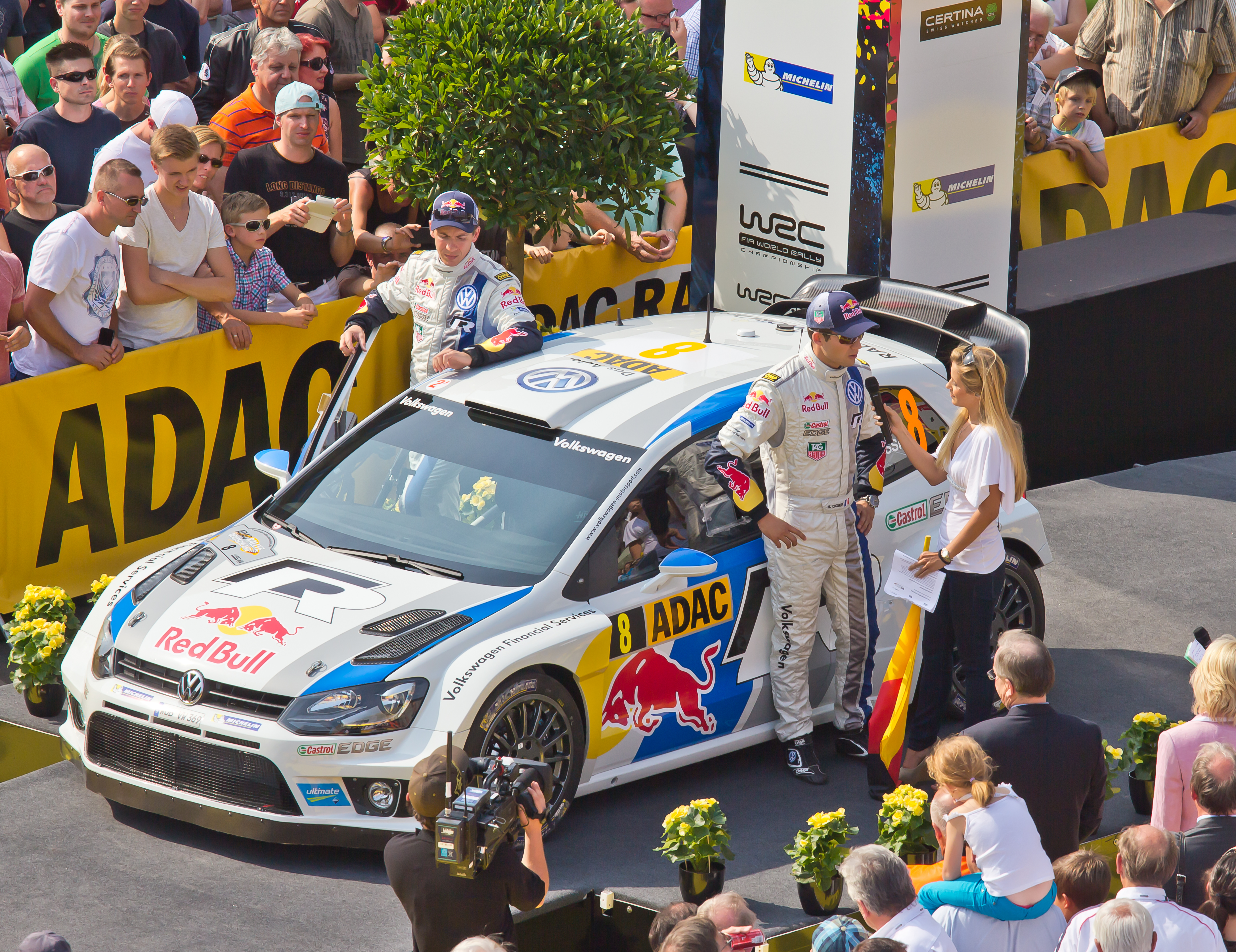 ADAC Rallye Deutschland 2013 - Fahrerpräsentation auf dem Roncalliplatz: Sébastien Ogier mit Co-Fahrer Julien Ingrassia und dem Volkswagen Polo R WRC